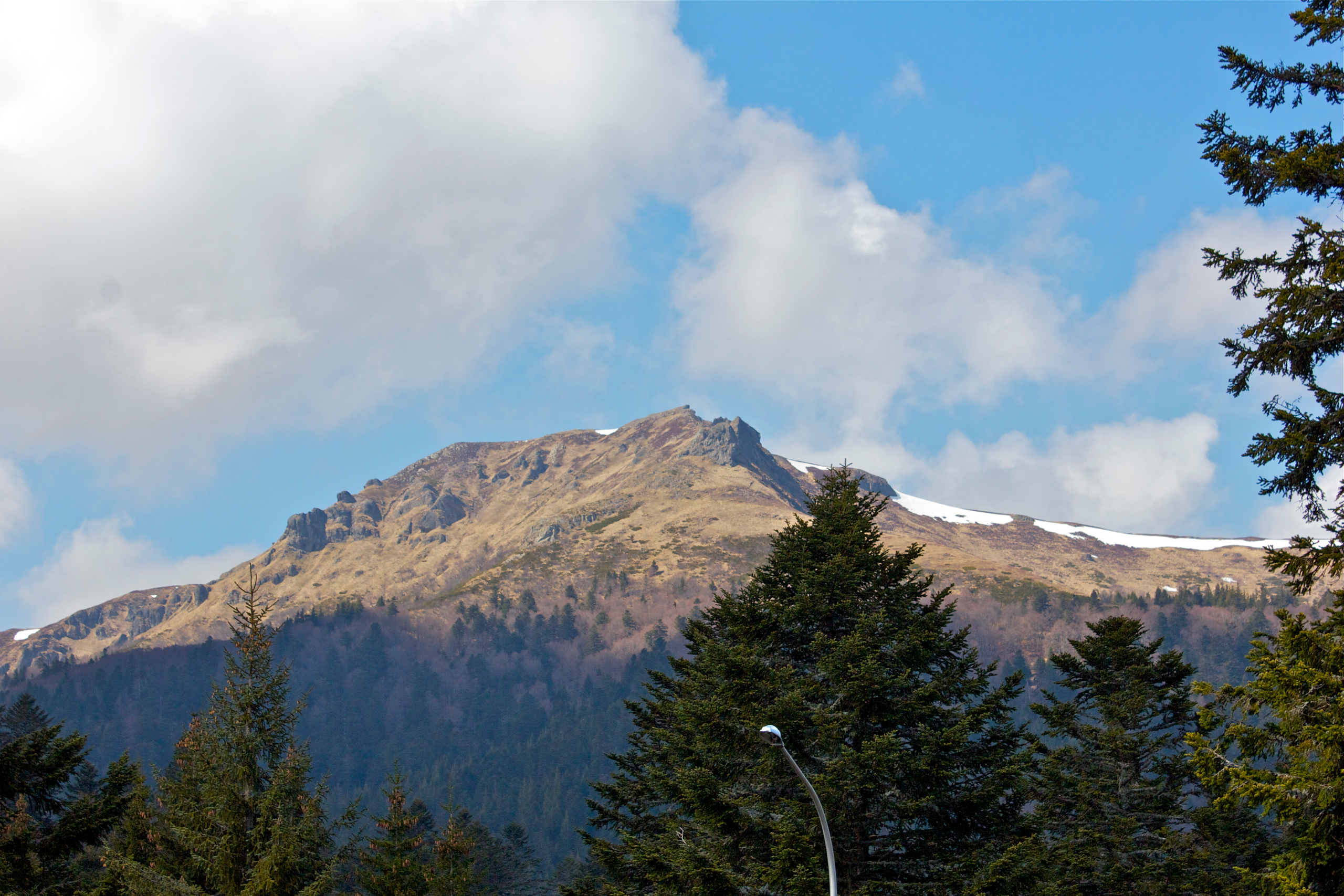 Le Bec de l'aigle pris en photo du Lioran, au printemps.